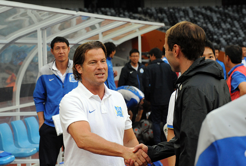 Roger Palmgren